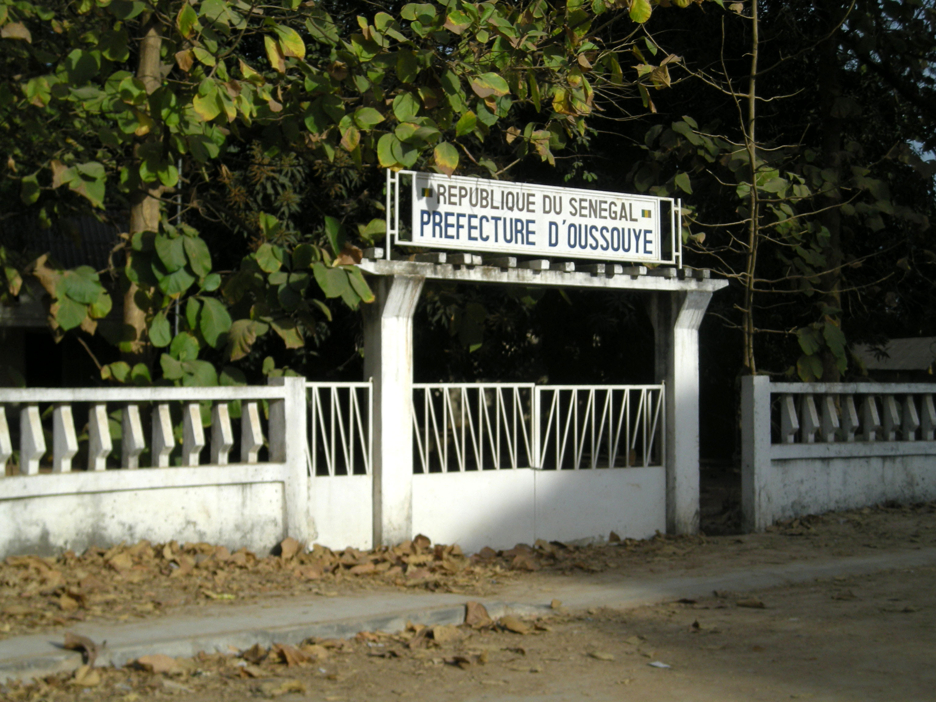 Préfecture d'Oussouye (Casamance, Sénégal)